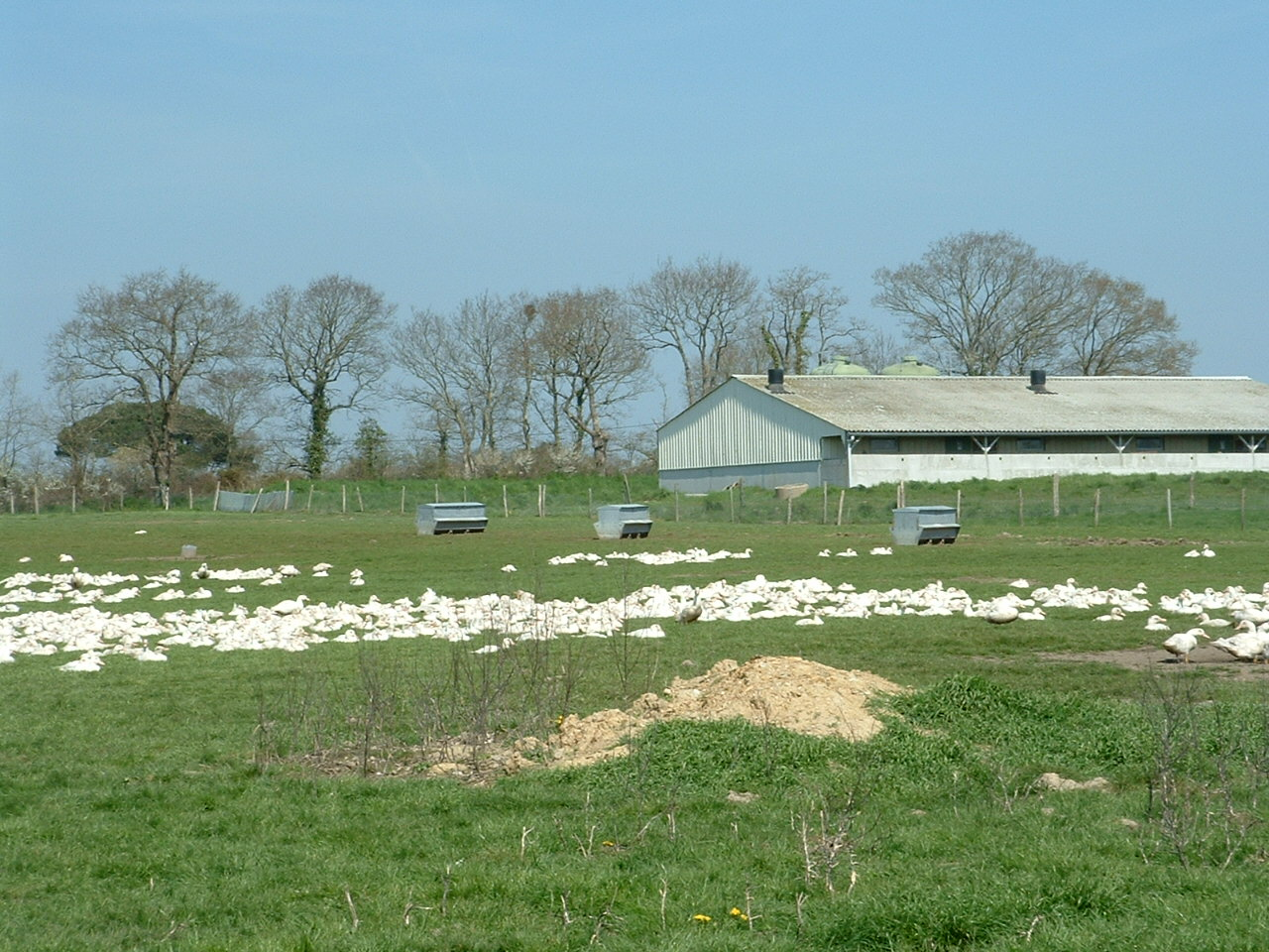 Chauvé (France) - Volaille élevée en plein air